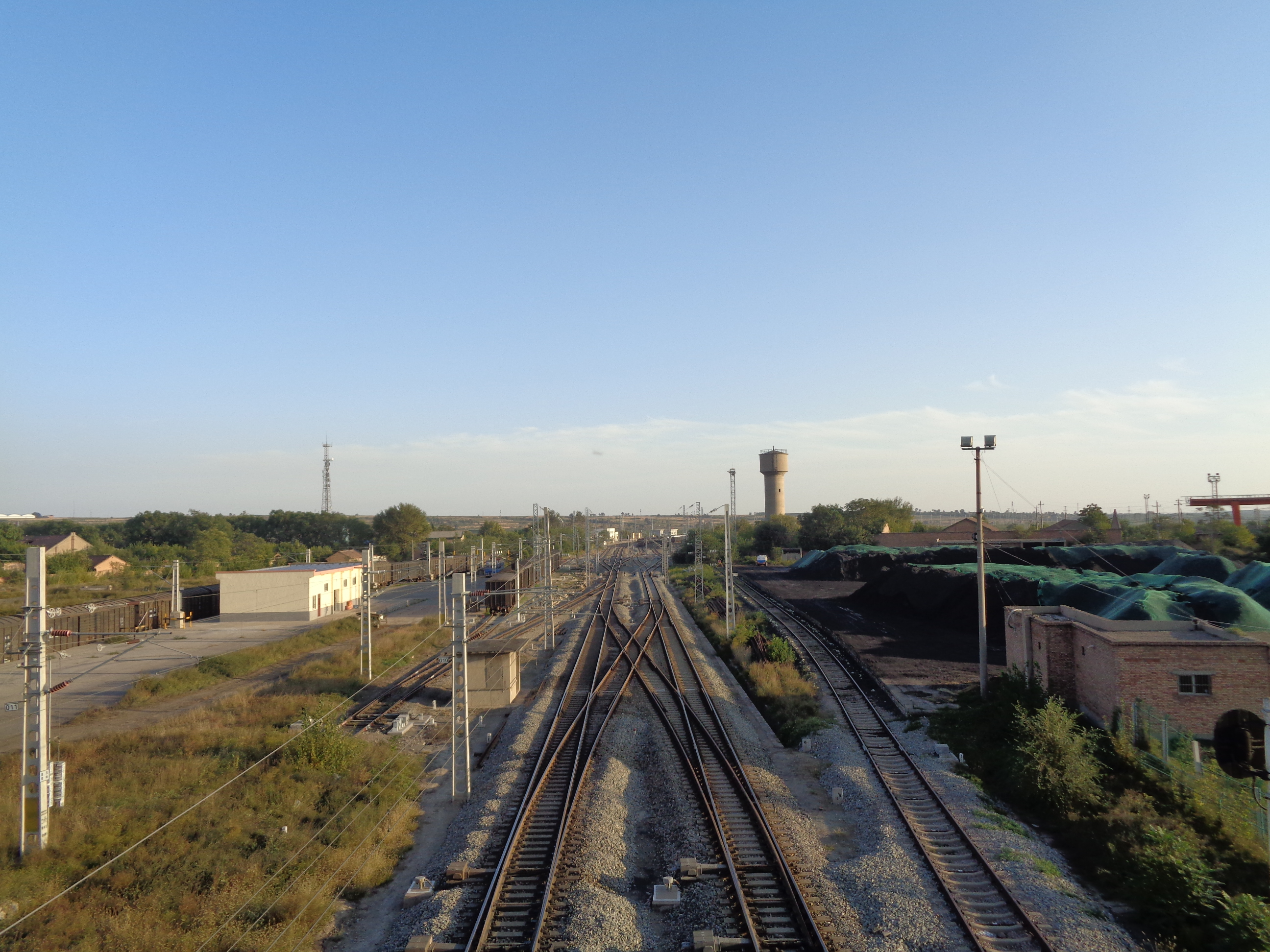 渭南市合阳县王村镇南蔡村合阳站之北的第一个跨铁路桥附近